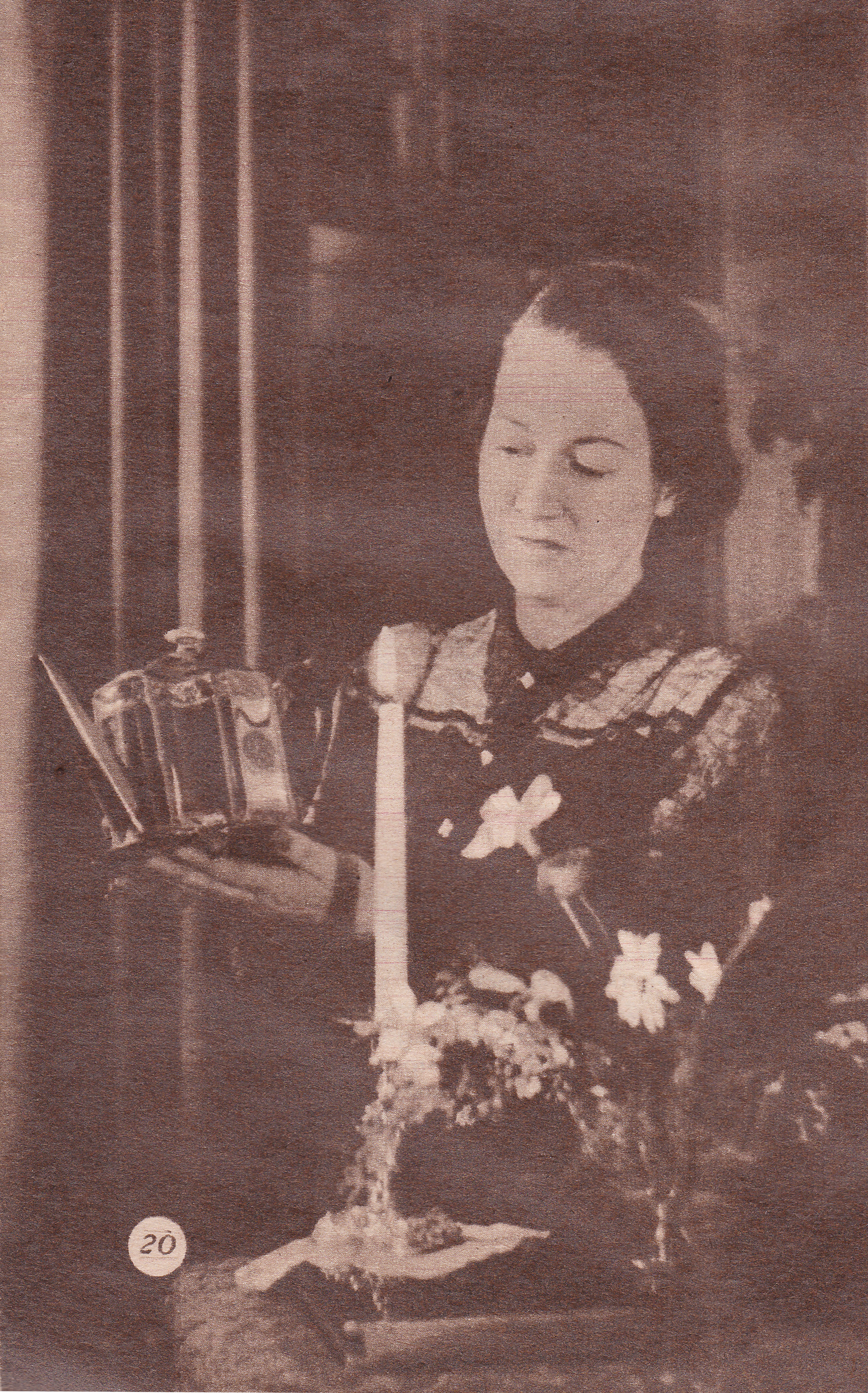 Thora Dardel förevisar en tekanna av engelskt silver från 1700-talet..